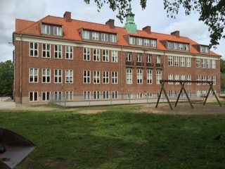 Detta är Själva Rutgerskolan från baksidan